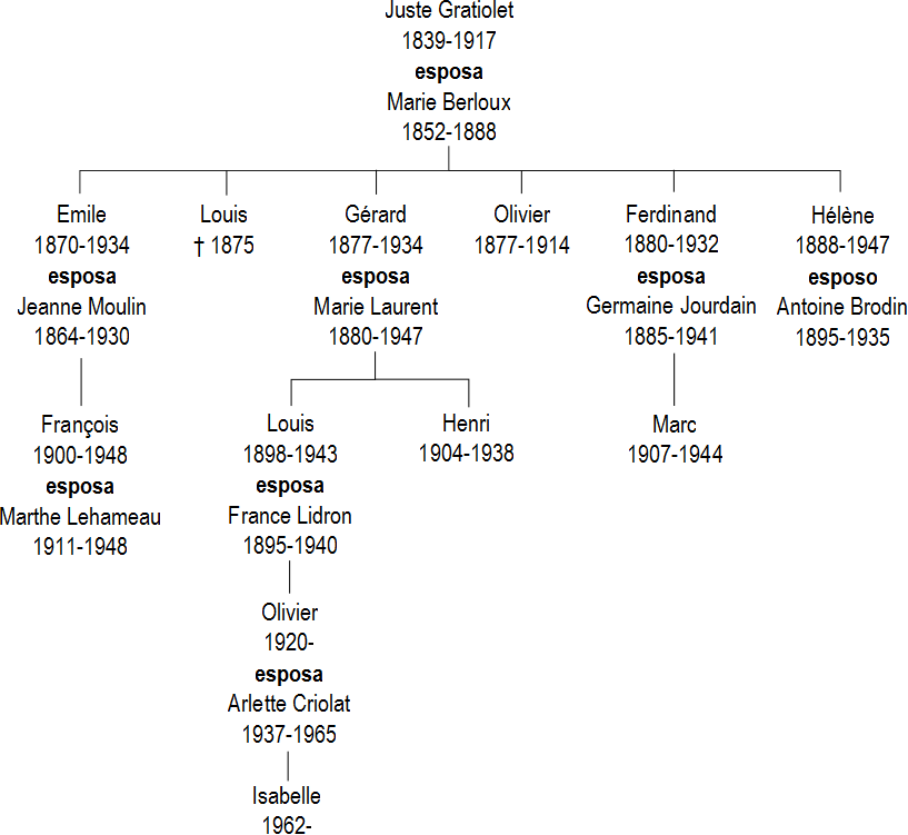 Árbol genealógico de la familia Gratiolet, en la novela "La vida instrucciones de uso" de Georges Perec.